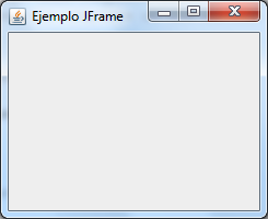 Ejemplo de una ventana JFrame usando la librería Java Swing